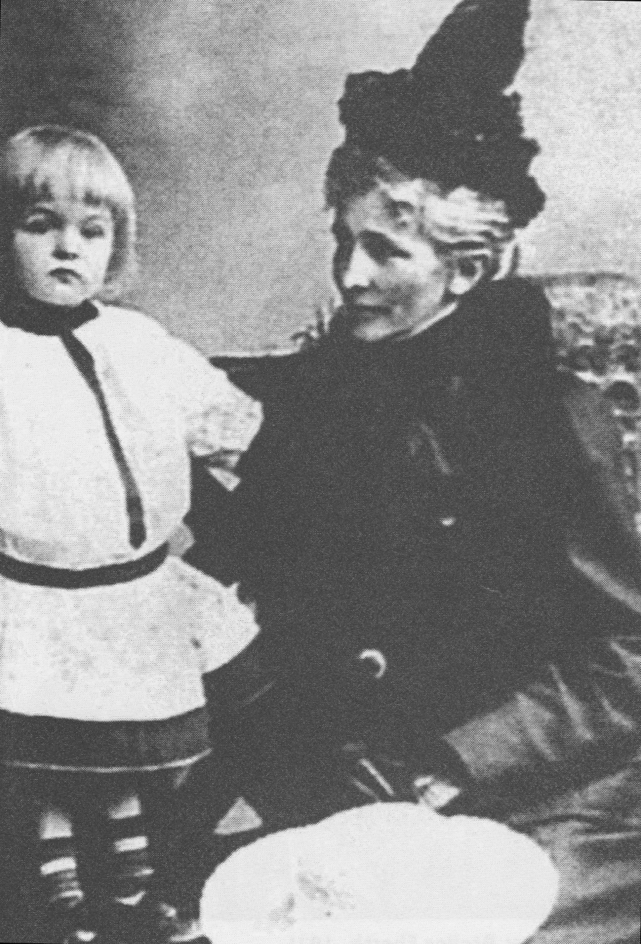 Fotografía de Anita Berber con su abuela materna (Luise Thiem) en 1901.